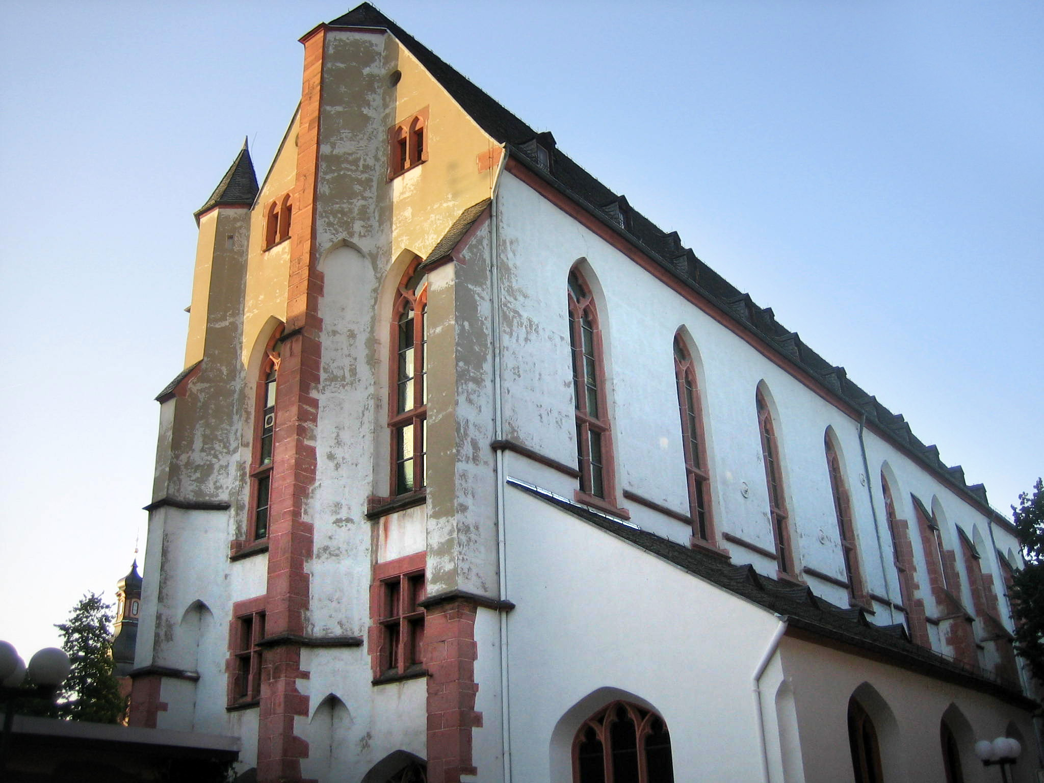 ehemaliges Reichklarakloster Mainz